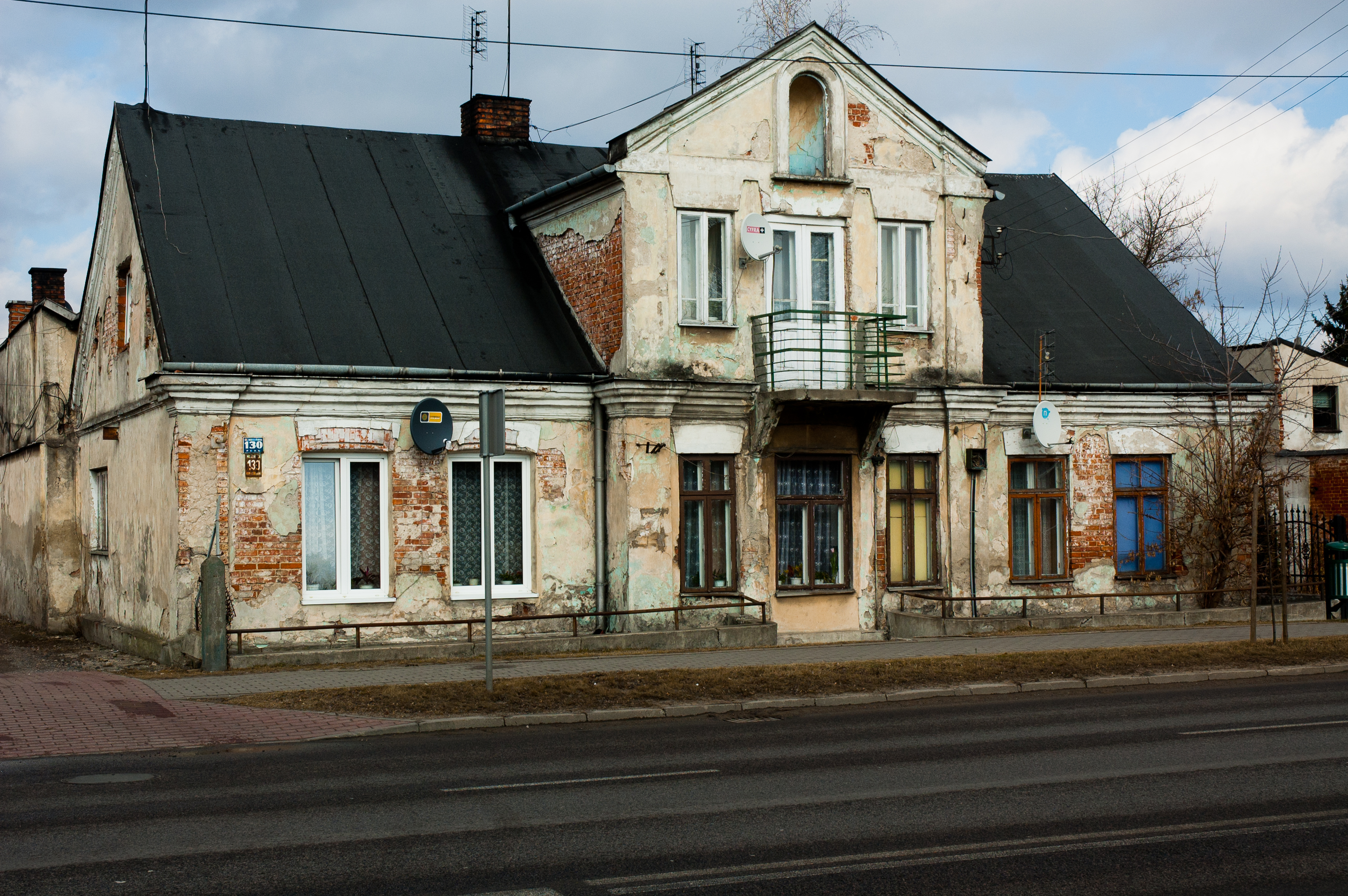 Budynek dawnego Urzędu Gminy Jabłonna